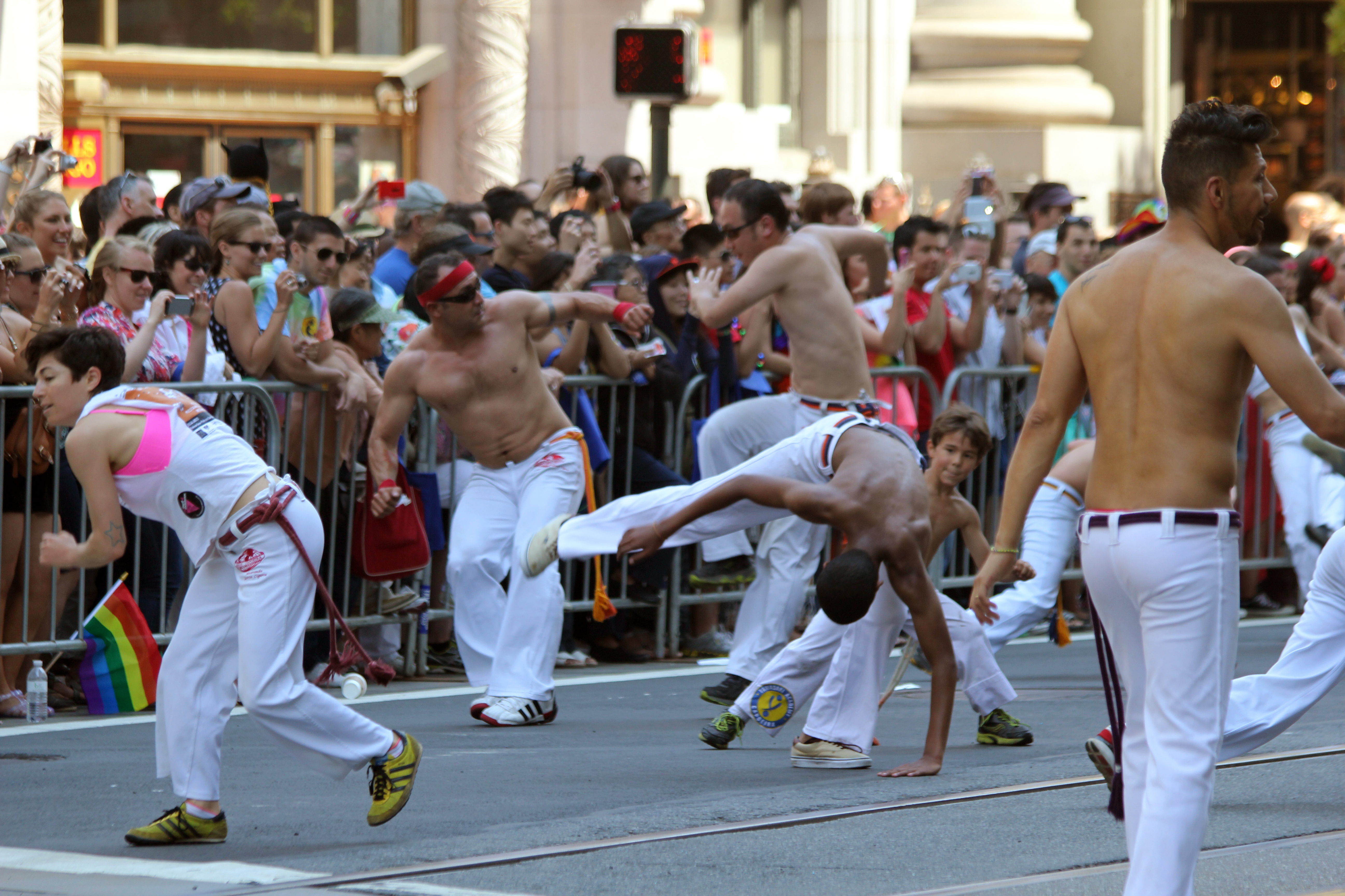 Capoeira